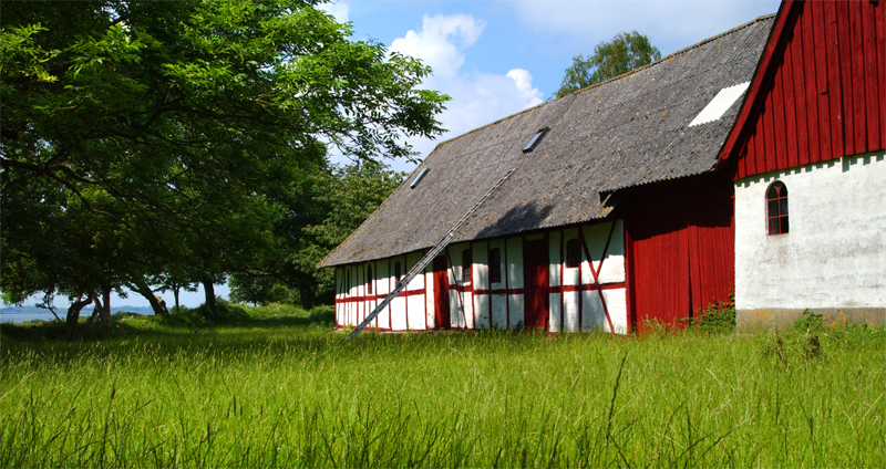 Gård på øen Romsø